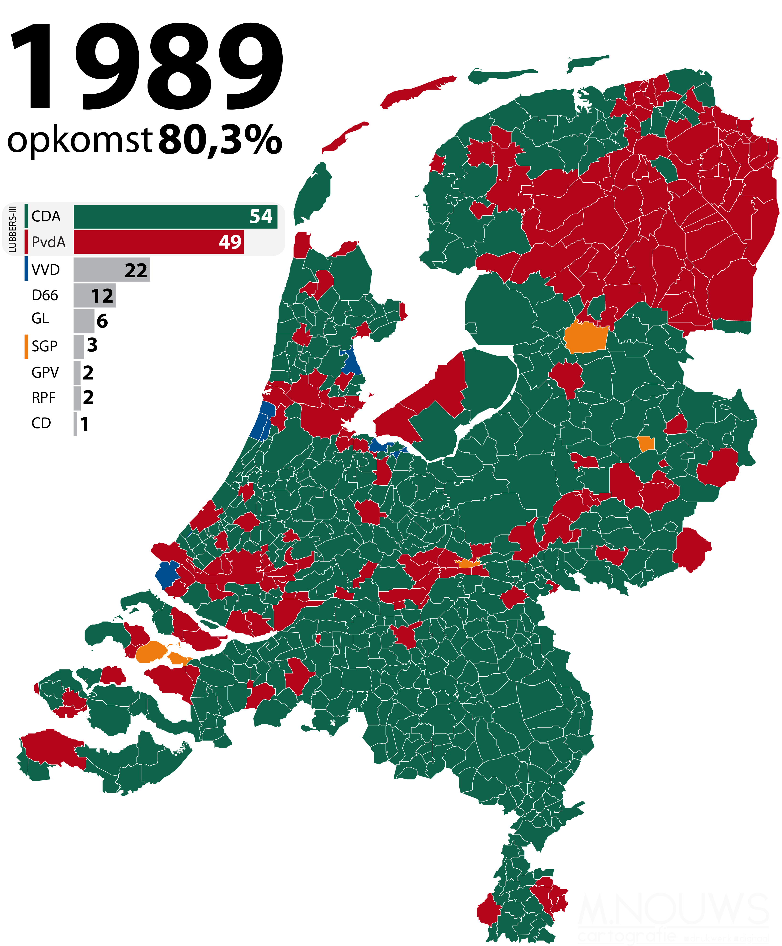 Grootste politieke partij per gemeente, zetelverdeling en kabinetscoalitie bij Tweede Kamerverkiezingen 1989